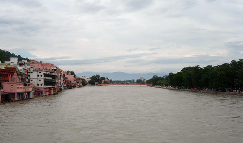 River Ganges (Ganga)